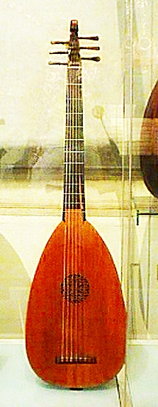 Gallichon, lutnia późnobarokowa, Muzeum Instrumentów Muzycznych w Pradze